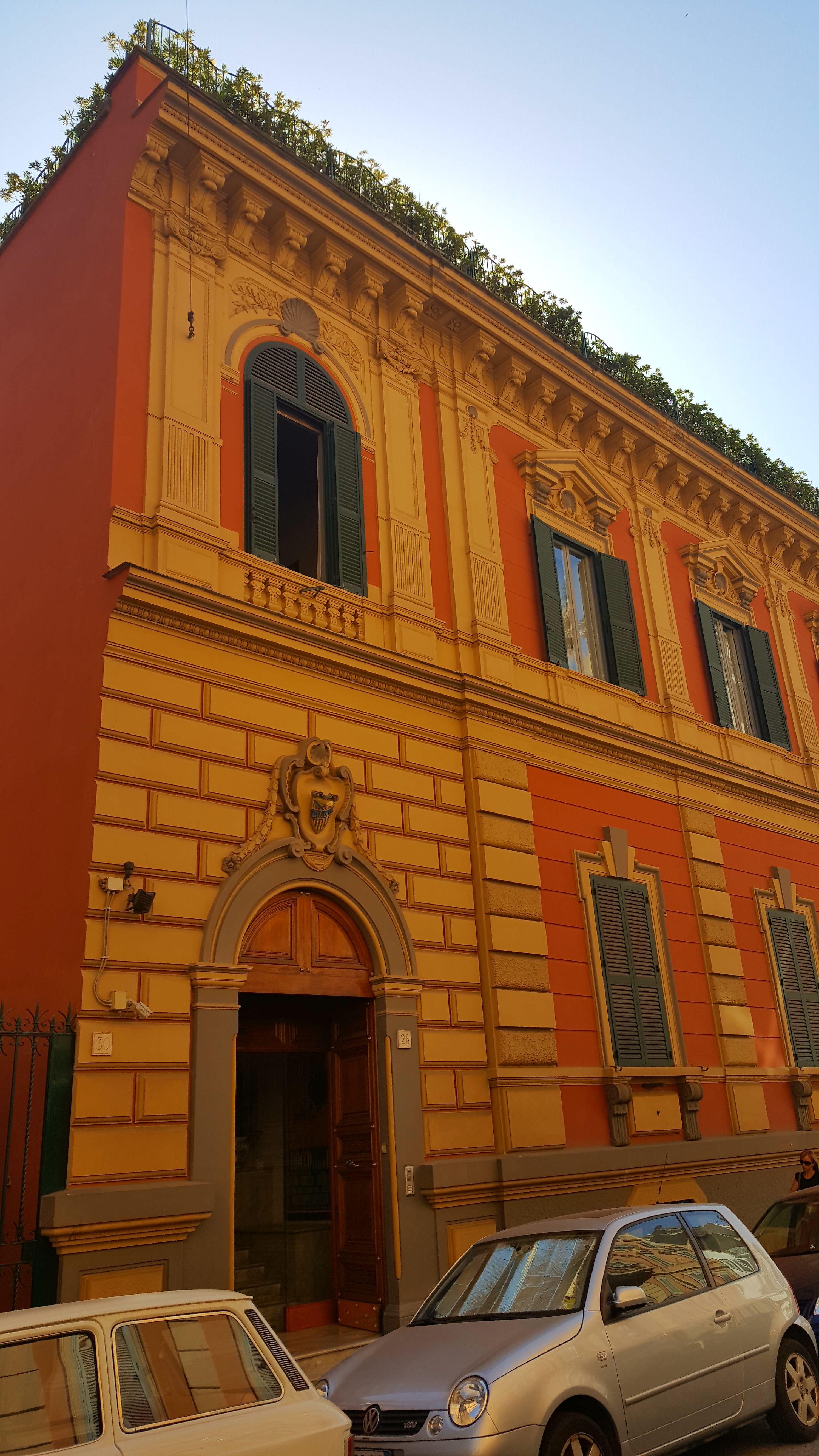 Sede della casa cinematografica Titanus, a Roma, via Sommacampagna, 28